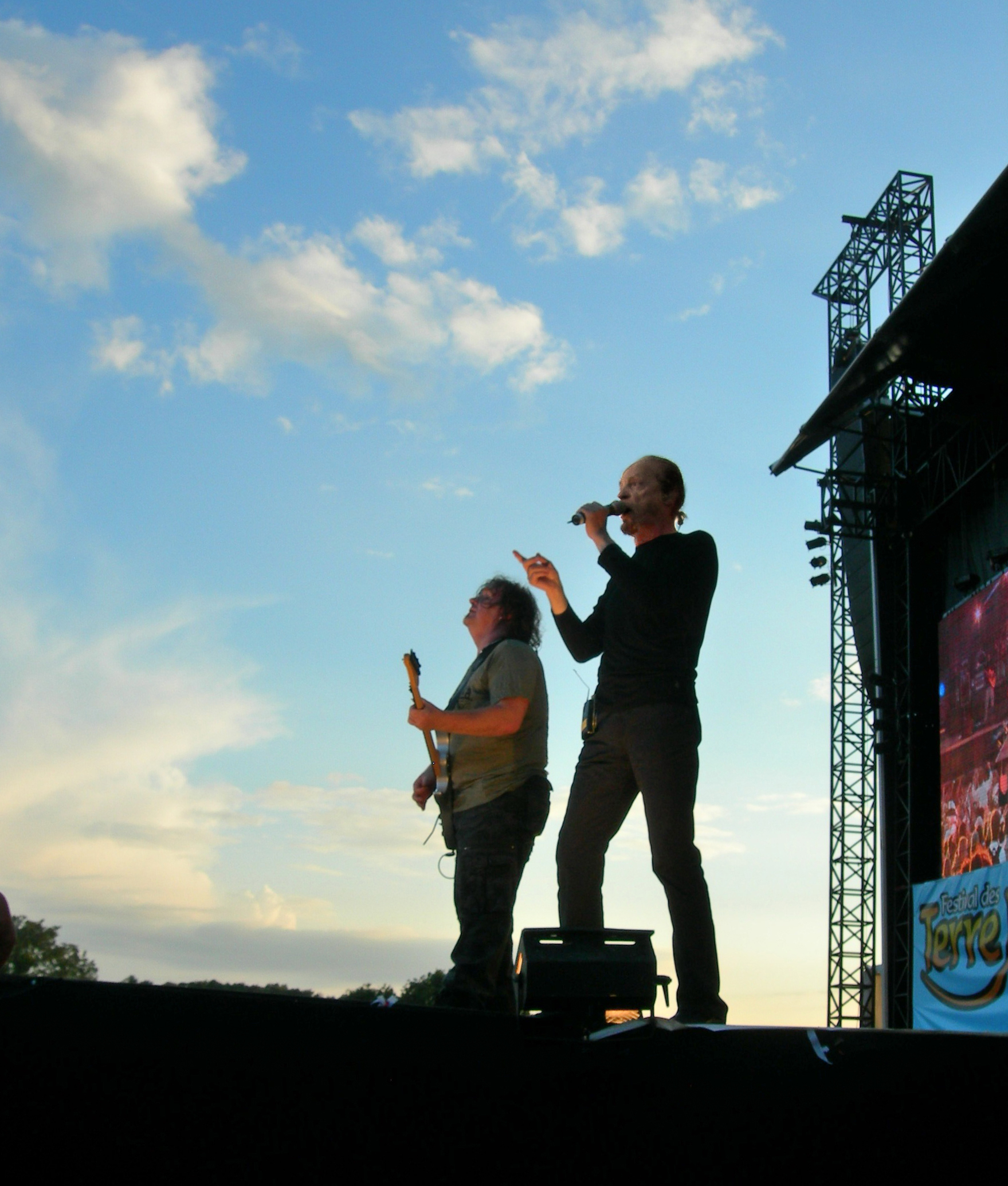 Concert du guitariste Pat O'May pour les 10 ans du festival des Terre-Neuvas à Bobital le 8 juillet 2007 avec son invité Alan Stivell devant 45 000 personnes.